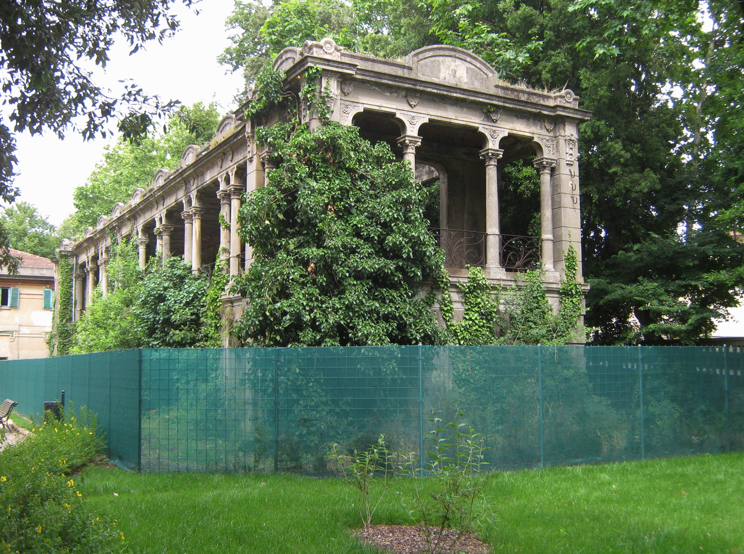 Livorno, stabilimento termale Acque della Salute: la loggia (in abbandono) progettata dall'ingegner Unis all'interno del parco.